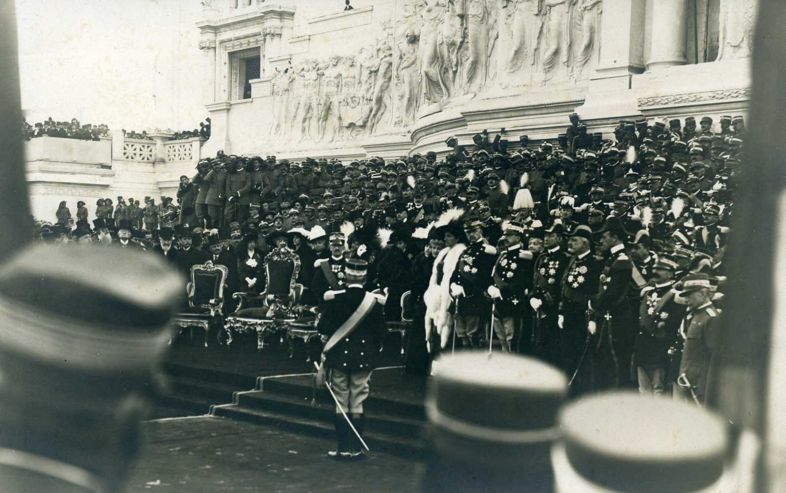 cerimonia dove Re Vittorio Emanuele III inaugura il Vittoriano nel 1911